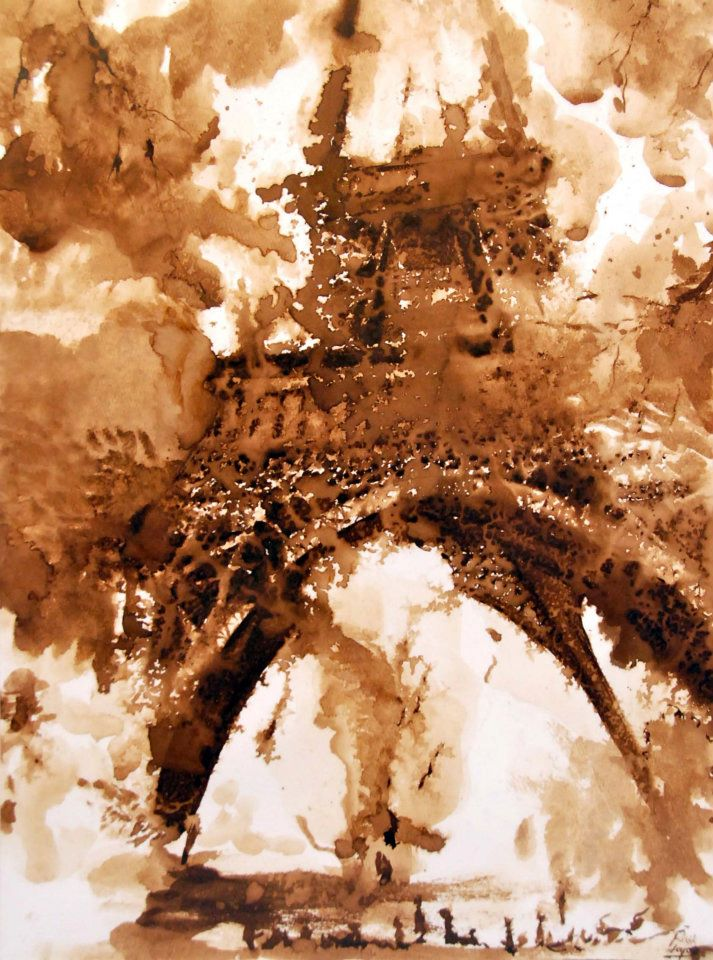 Eiffel-torony (Párizs), tusrajz